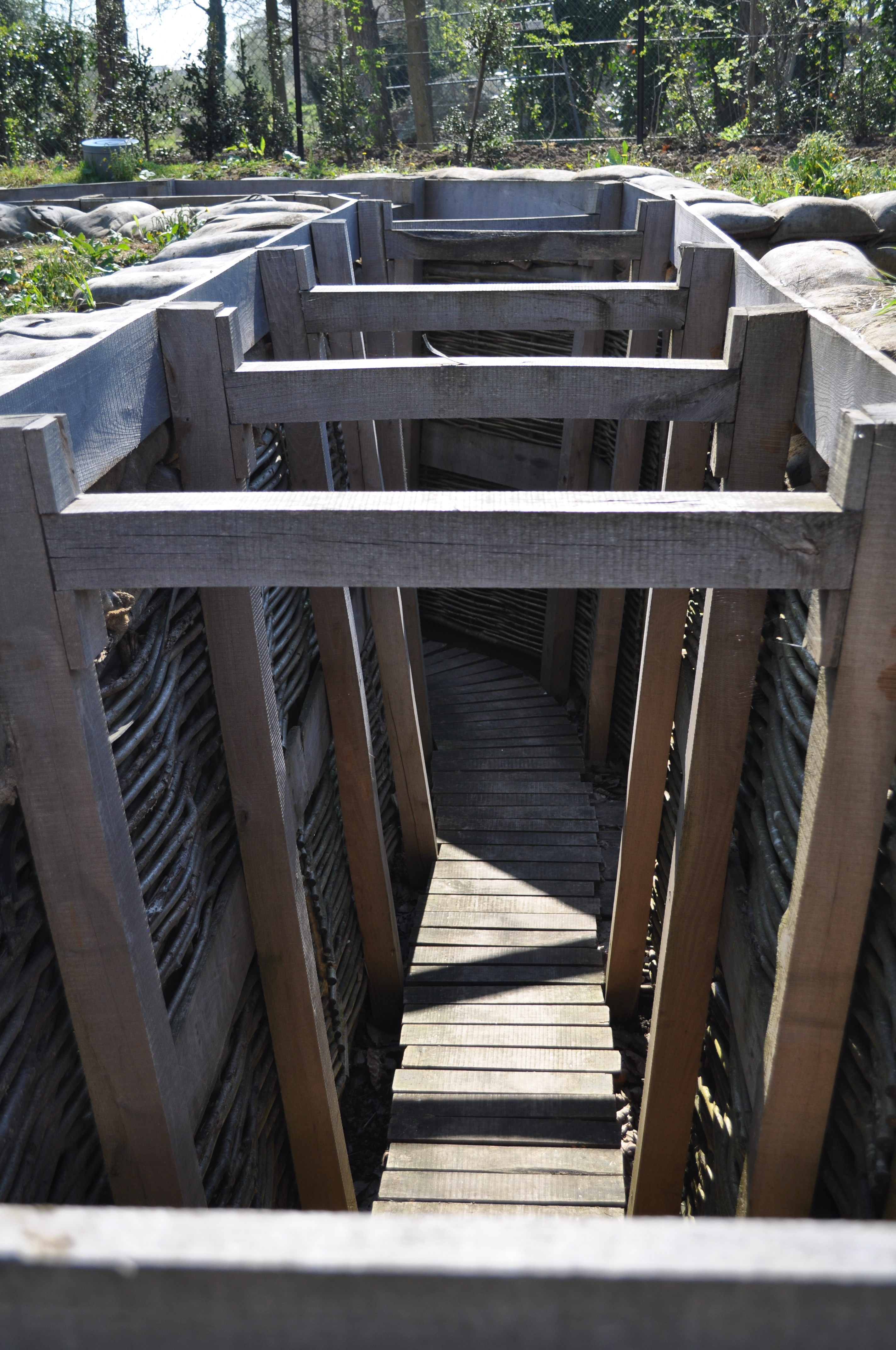 voorbeeld van de loopgraven